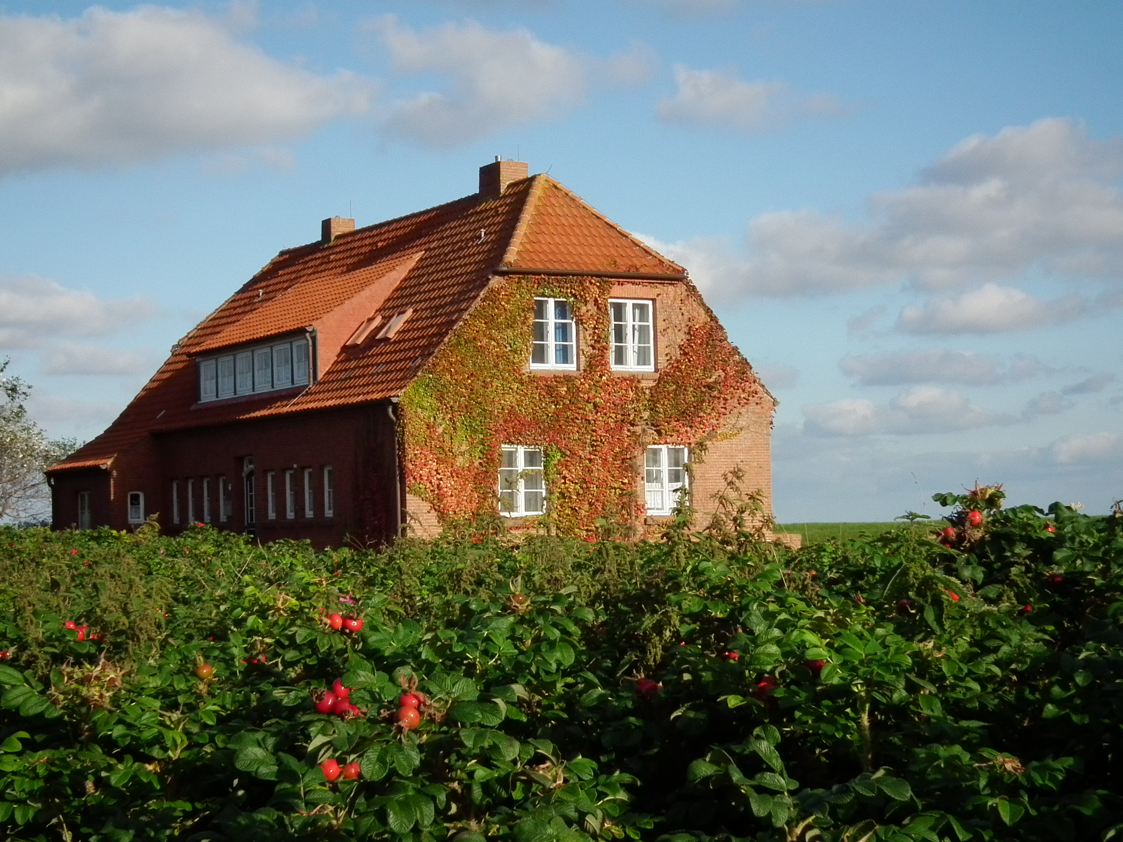 Wohnhaus, bewachsen mit Wildem Wein, umsäumt von einer Hecke der Inselrose (Rosa rugosa) im Ortsteil Loog der ostfriesischen Nordseeinsel Juist (Niedersachsen, Deutschland)